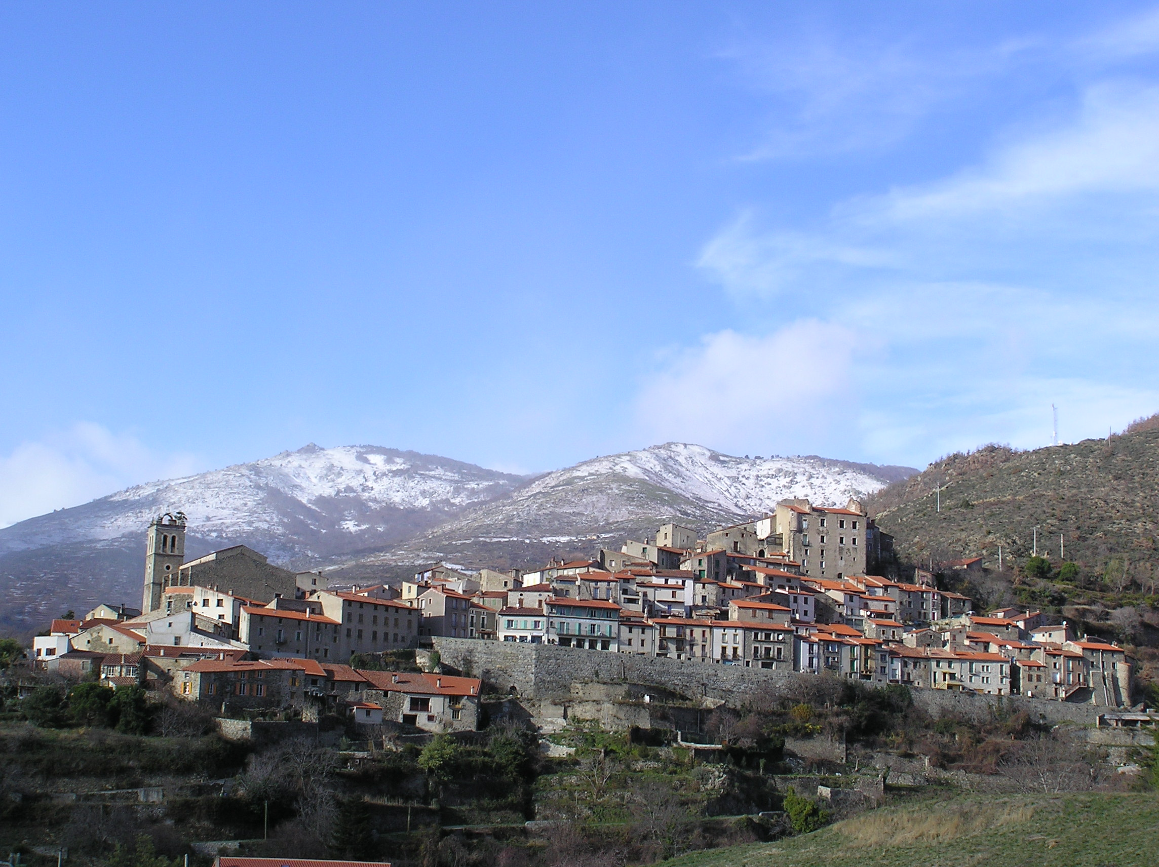 Photo du village depuis la route de la Carole vers Campome